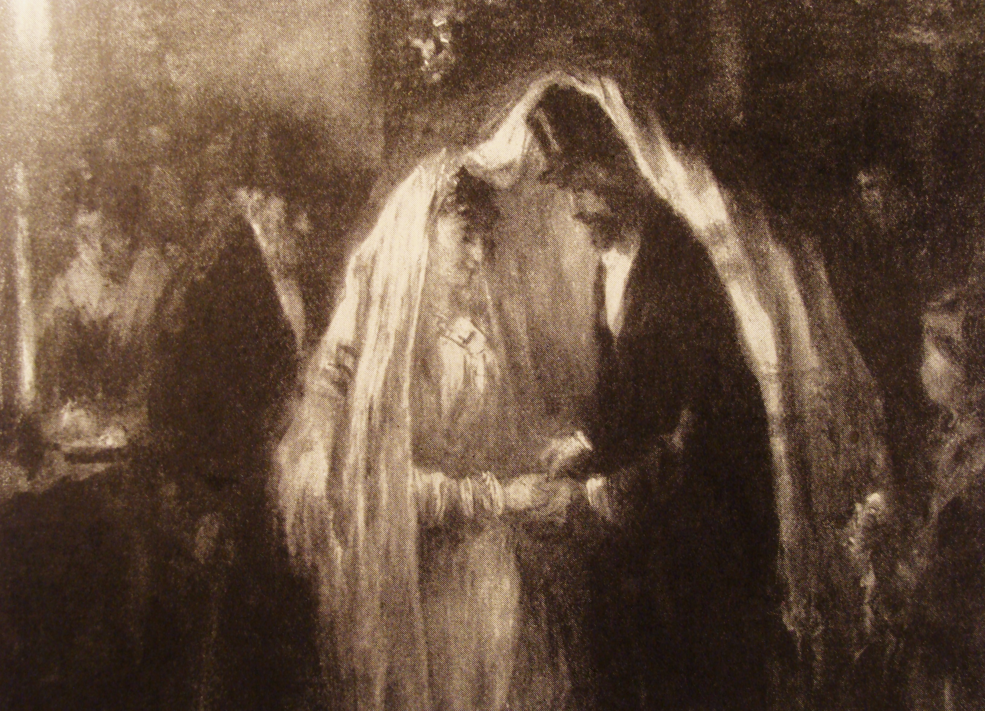 Peinture de Jozef Israëls (1824-1911) : die jüdische Hochzeit (le mariage juif), 1903, photographie prise à Vienne (Autriche)